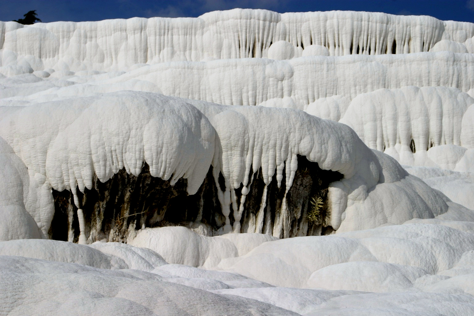 Pamukkale